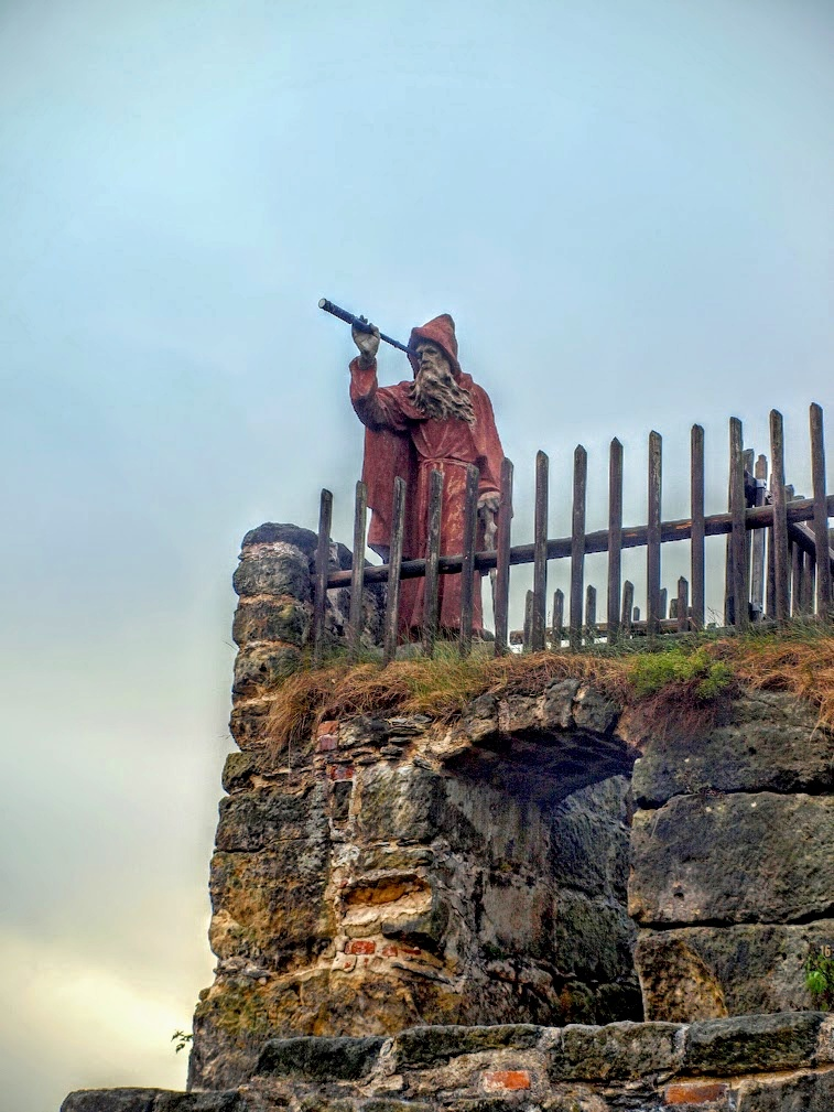 Sloup, skalní hrad